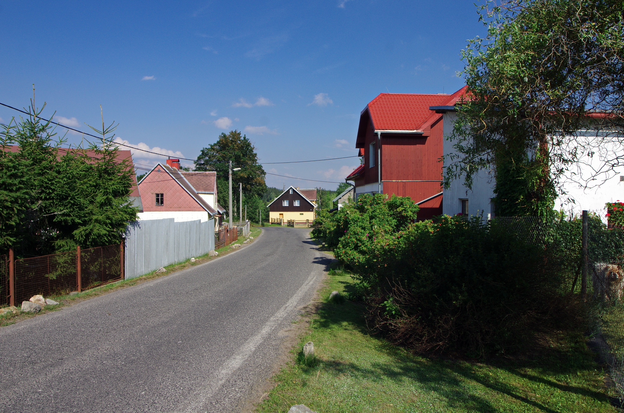 osada Hradecká (Jindřichovice), krušné hory, okres Sokolov